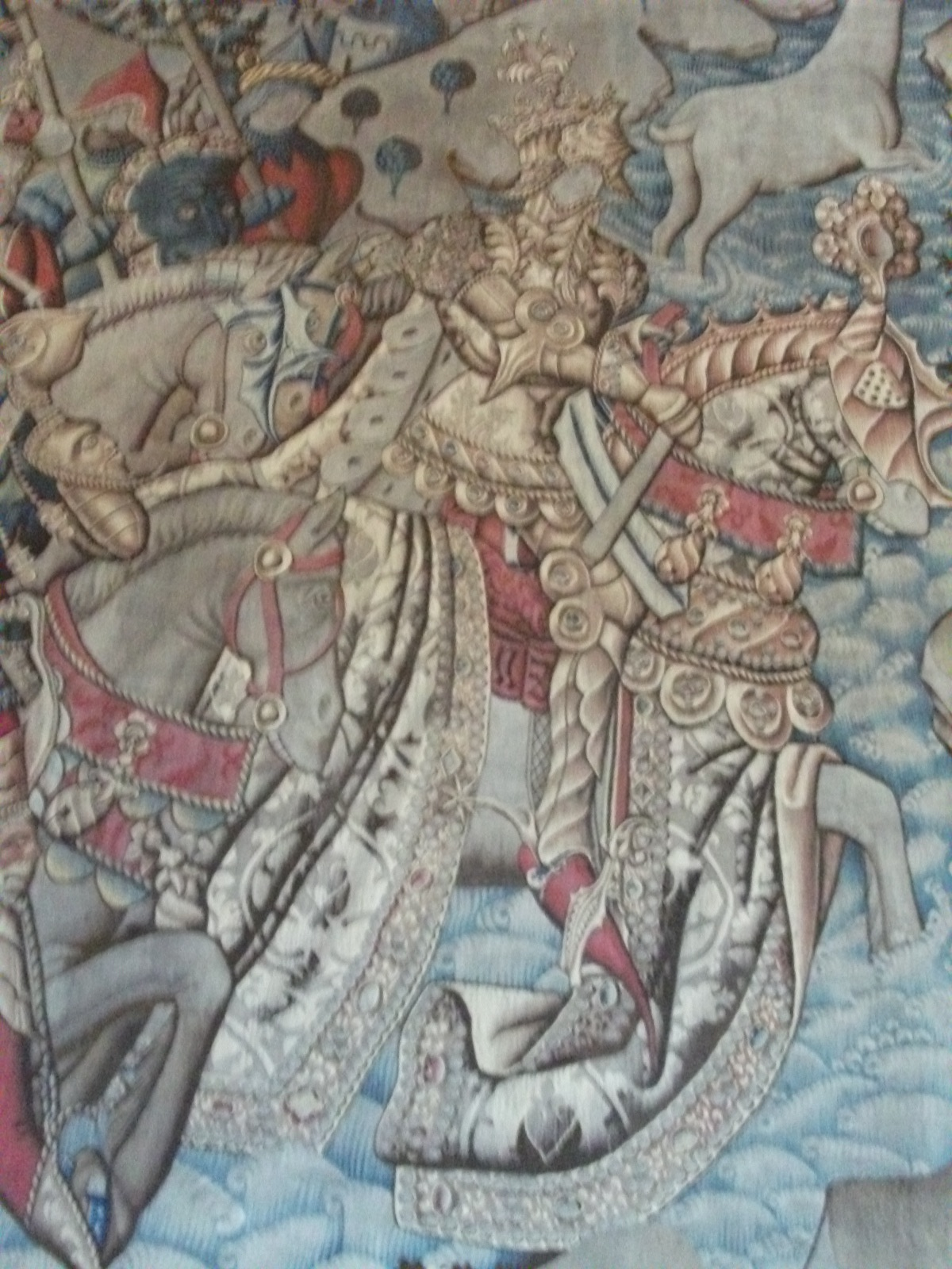 Détail partie droite de la tapisserie de la Guerre contre Gondebaud (roi de Bourgogne) et Alaric (roi des Goths) : le franchissement miraculeux de la Vienne grâce au cerf blanc indiquant le passage à gué.